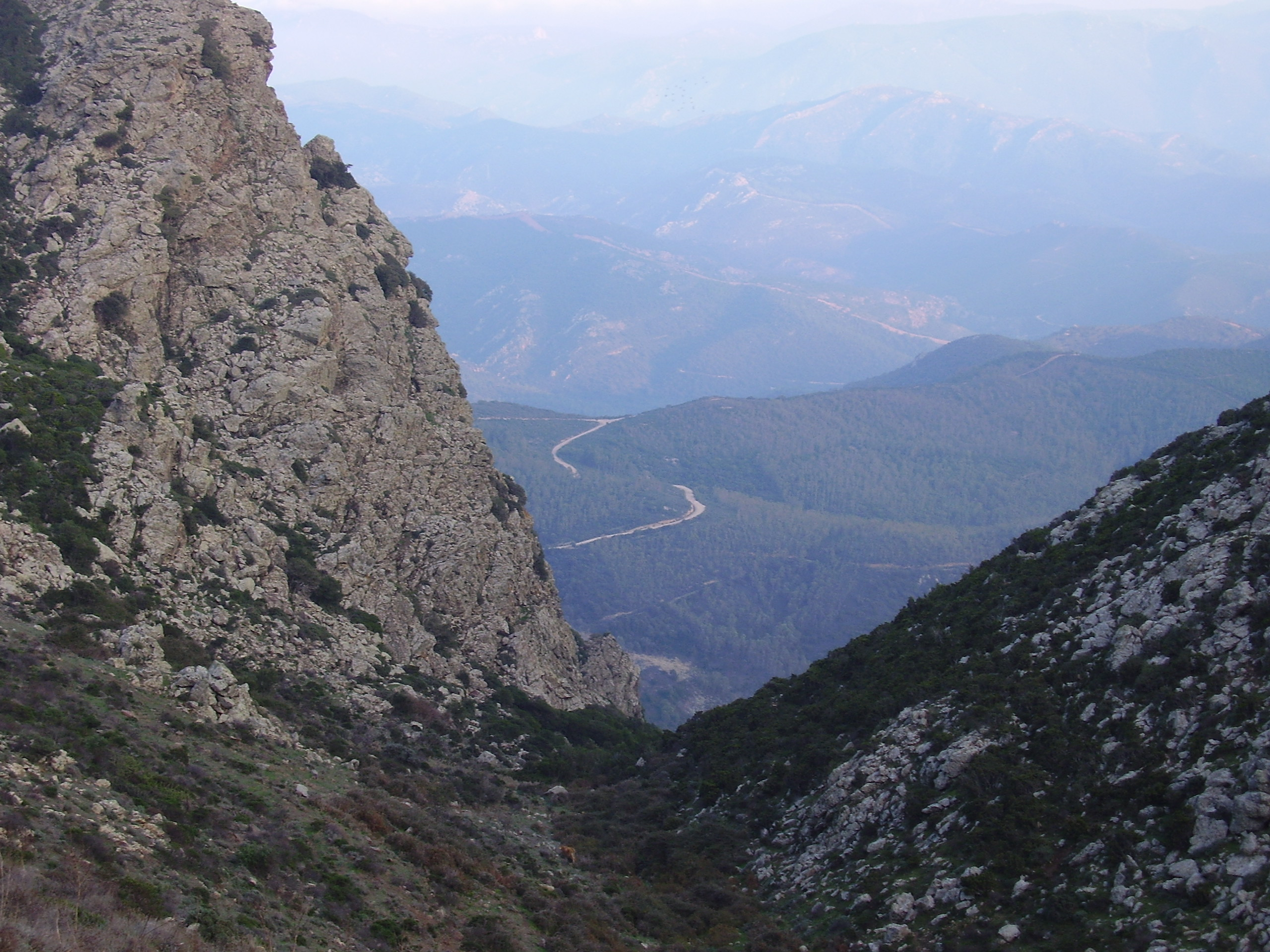 Strada per il Monte Serpeddì (Parco dei Sette Fratelli - Monte Genis, Sinnai) vista da Corr'e Cebru. foto personale, ottobre 2006